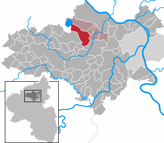 Kruft in Rhineland-Palatinate - district Mayen-Koblenz